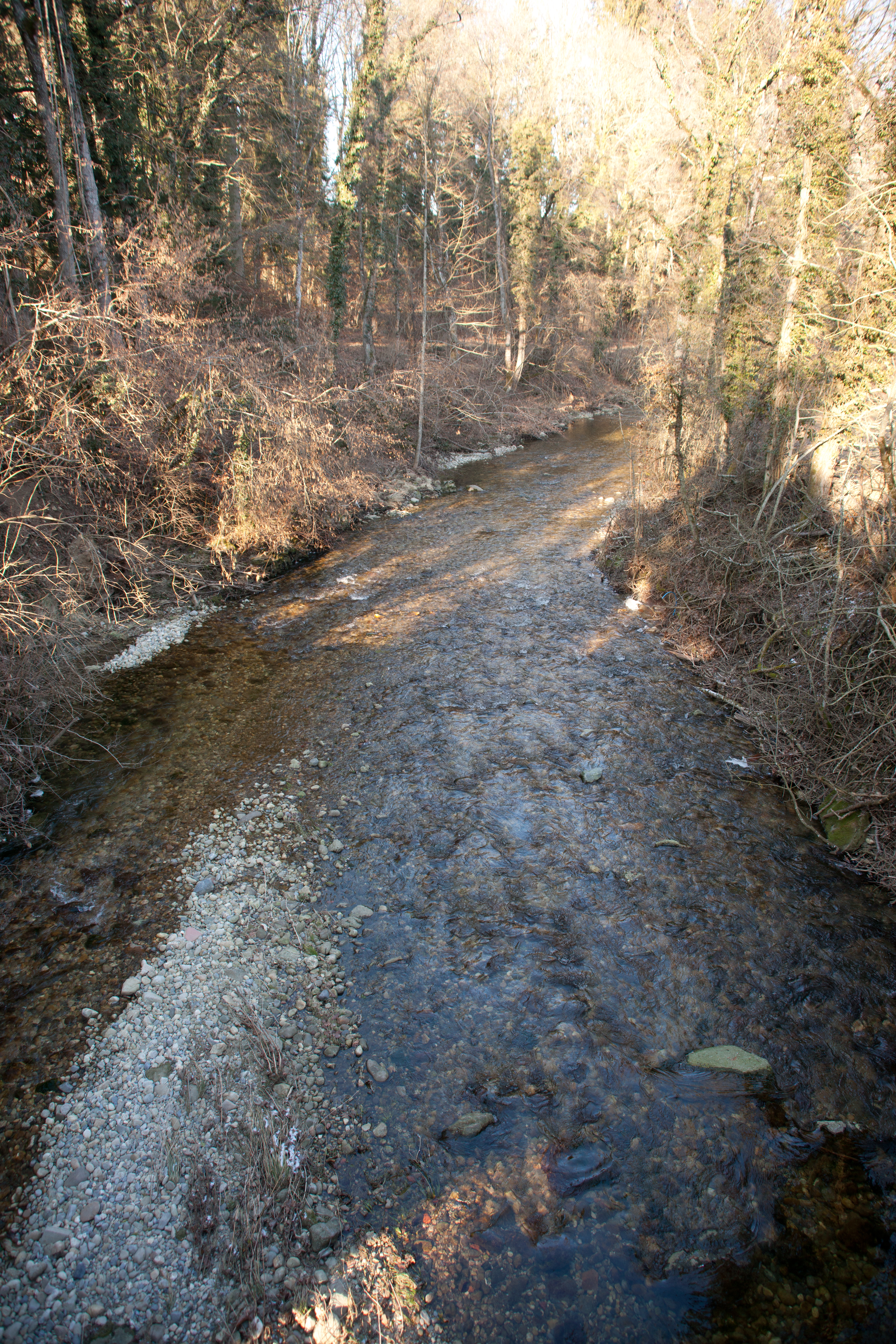 Le Veyron entre Dizy et Chevilly.